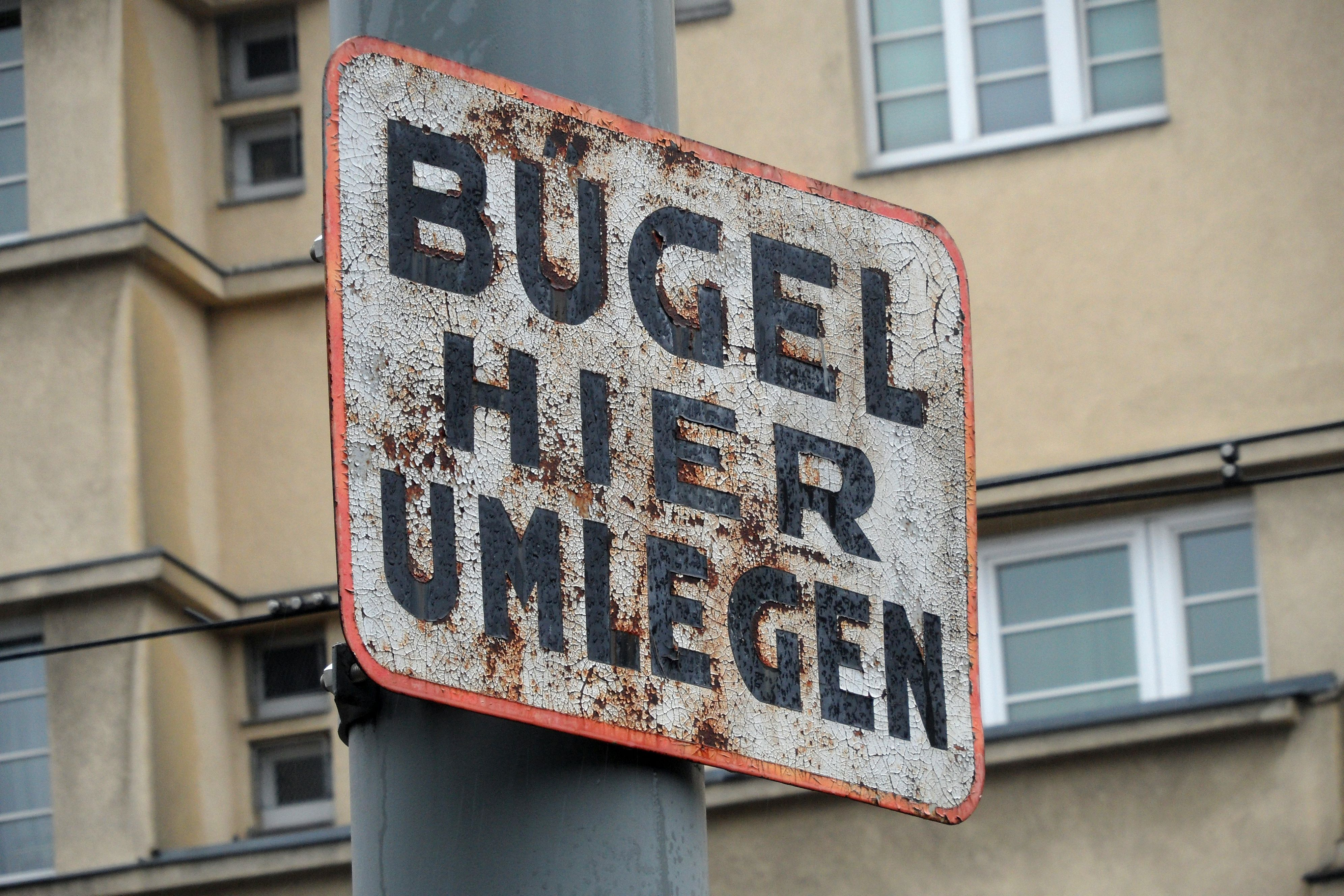 Das Schild kennzeichnet einen Abschnitt, wo die Fahrleitung besonders hoch und fallweise weniger stark abgespannt ist. Damit ist es hier möglich, einen Lyrabügel in die benötigte Richtung umzulegen, ohne Stromabnehmer, Schleifleiste(n) oder die Fahrleitung zu beschädigen